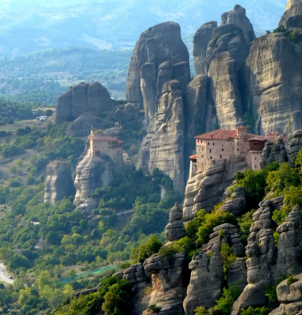 Los monasterios son joya de la cristiandad ortodoxa. Diseminados por toda la Grecia, por las montañas, por las llanuras y las islas, continuan su historia secular como lugares de fe, devociòn, serenidad pero, también, de trabajo comunitario, con monjes y monjas consagrados a Dios, que viven el resto de su vida en oraciòn, castidad y sin bienes terrenales.